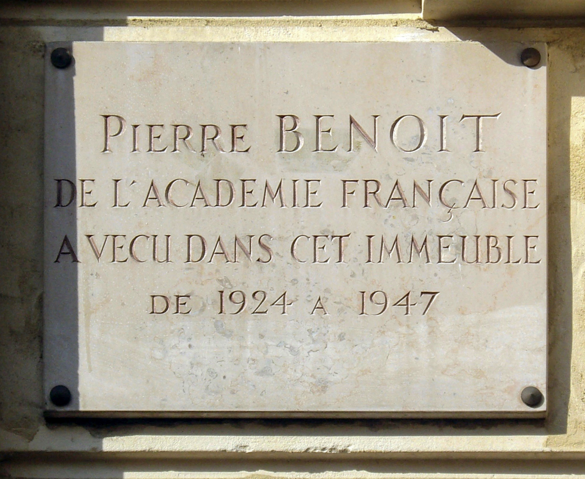 Plaque apposée au n° 120 de la rue d'Assas, Paris 6e, où vécut le romancier Pierre Benoit (1886-1962) de 1924 à 1947.